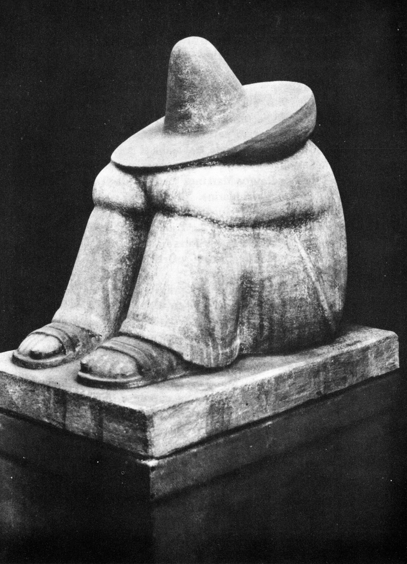 Fotografía de una escultura de 60 cm de alto denominada El Pensamiento que se encuentra en el Museo de Arte de La Paz, en Bolivia cuyo autor es Rómulo Rozo, escultor colombiano-mexicano, fallecido en Mérida, Yucatán en 1964.